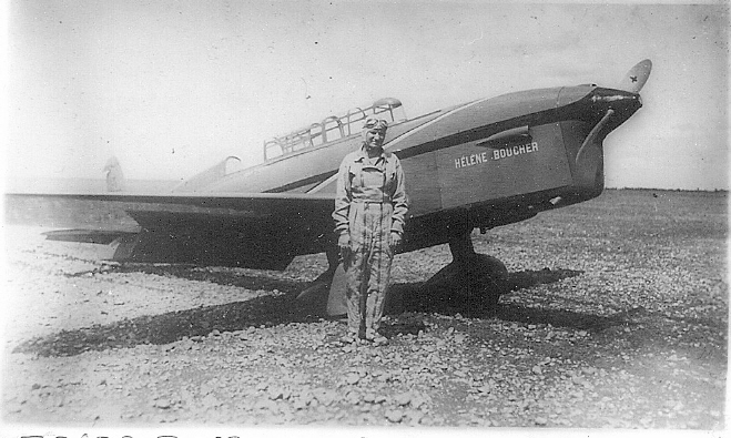 Hélène Boucher photographiée devant son avion Caudron Rafale en 1934.